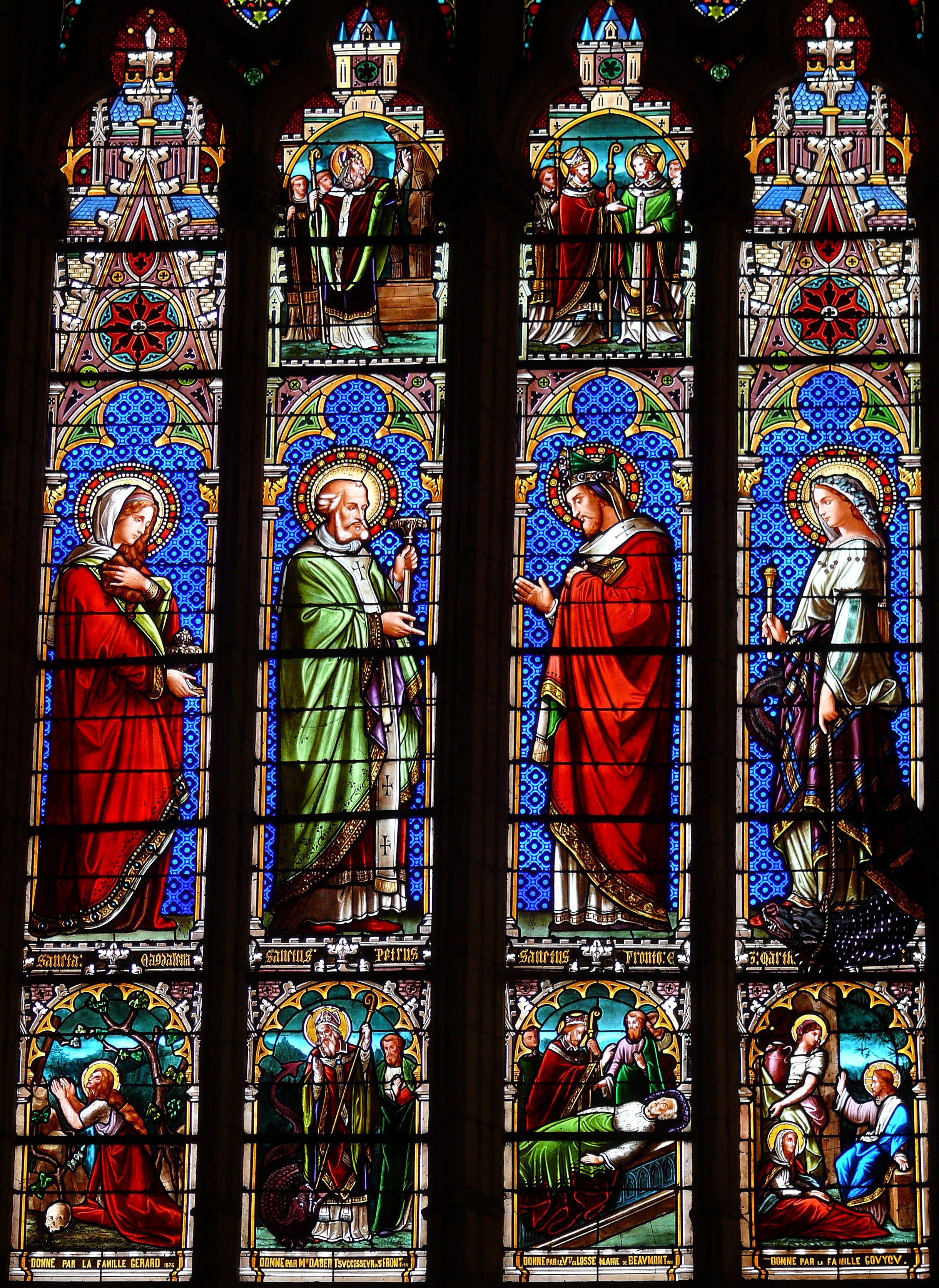 Beaumont-du-Périgord - Saint-Laurent-et-Saint-Front - Vitraux du chevet : sainte Madeleine, saint Pierre, saint Front et sainte Marthe (XIXe siècle).